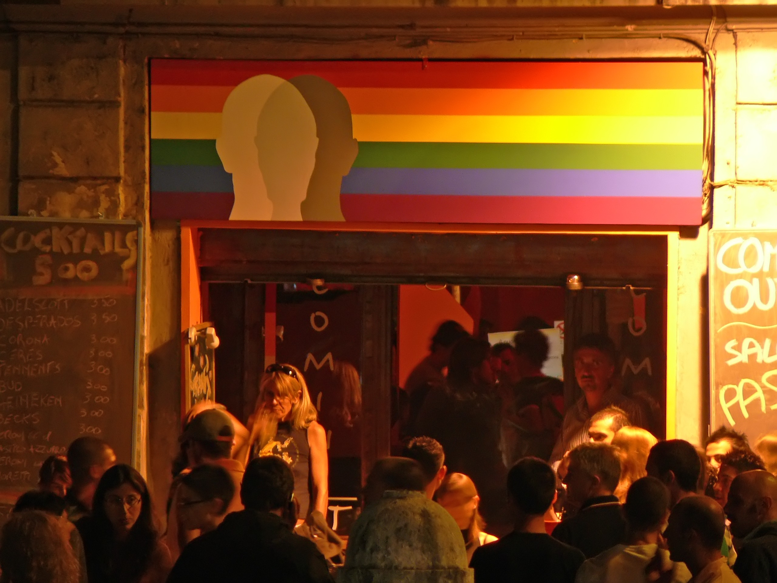 Ingresso dell'LGBT bar "Coming Out" in via di S. Giovanni in Laterano a Roma